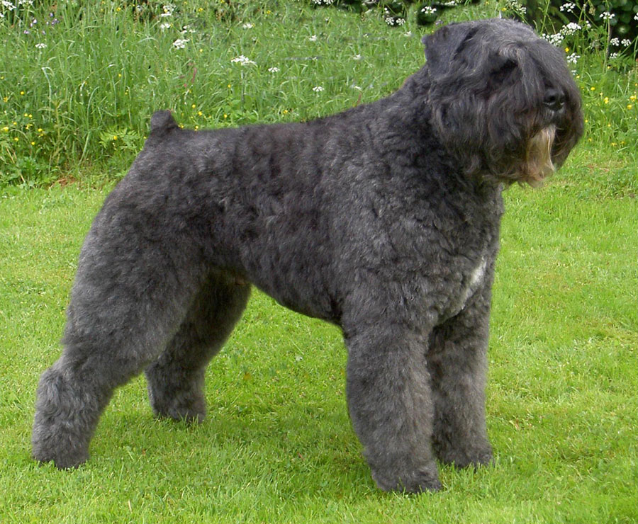 Ygor-Raiza v.d. Vanenblikhoeve